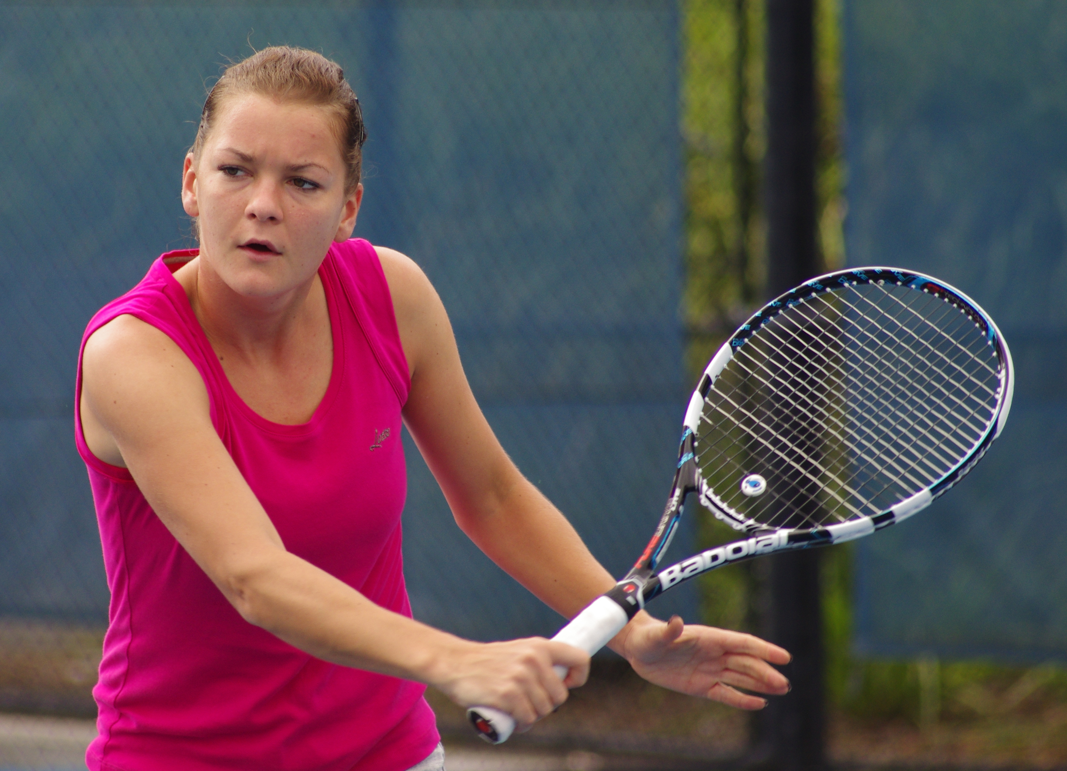 Agnieszka Radwańska